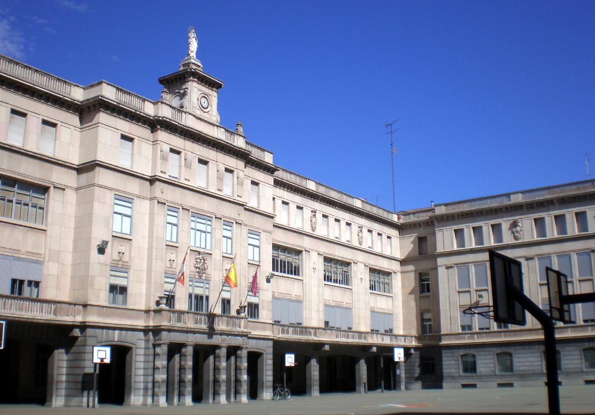 Colegio Nuestra Señora de Lourdes de Valladolid (España), en la actualidad.